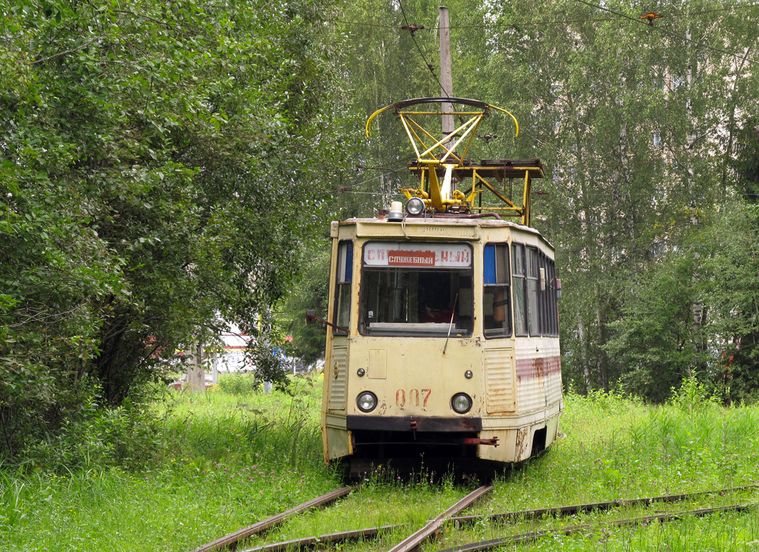 Новополоцк 71-605 № 007